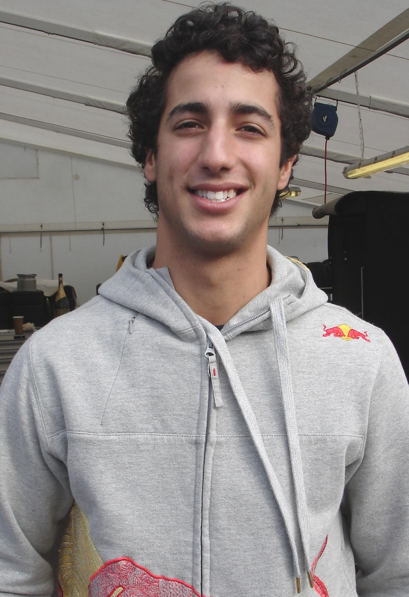 Daniel Ricciardo, Bild entstanden im Rahmen des DTM-Rennwochenendes auf dem Hockenheimring.